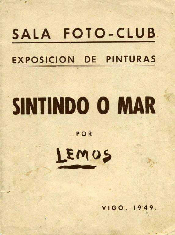 exposicion 1949